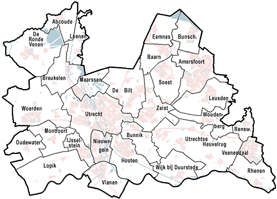 Provincie Utrecht, met indeling van gemeenten (2010). Door Jan-Willem van Aalst, samengesteld uit publiek beschikbare geo-data: Referentie-ondergrond (kustlijn, steden, wegen) gerasterd uit de OpenStreet Map OSM. ( Inhoud is beschikbaar onder de Creative Commons Attribution-ShareAlike 3.0 license. Vectorgrenzen van gemeenten en regio's vrij ter beschikking gesteld met dank aan cartografen van brandweerregio's Hollands-Midden en IJsselland; gerasterd in Photoshop. Overige kenmerken op de kaart: eigen tekenwerk van Jan-Willem van Aalst, op basis van gerasterde gemeentegrenzen.